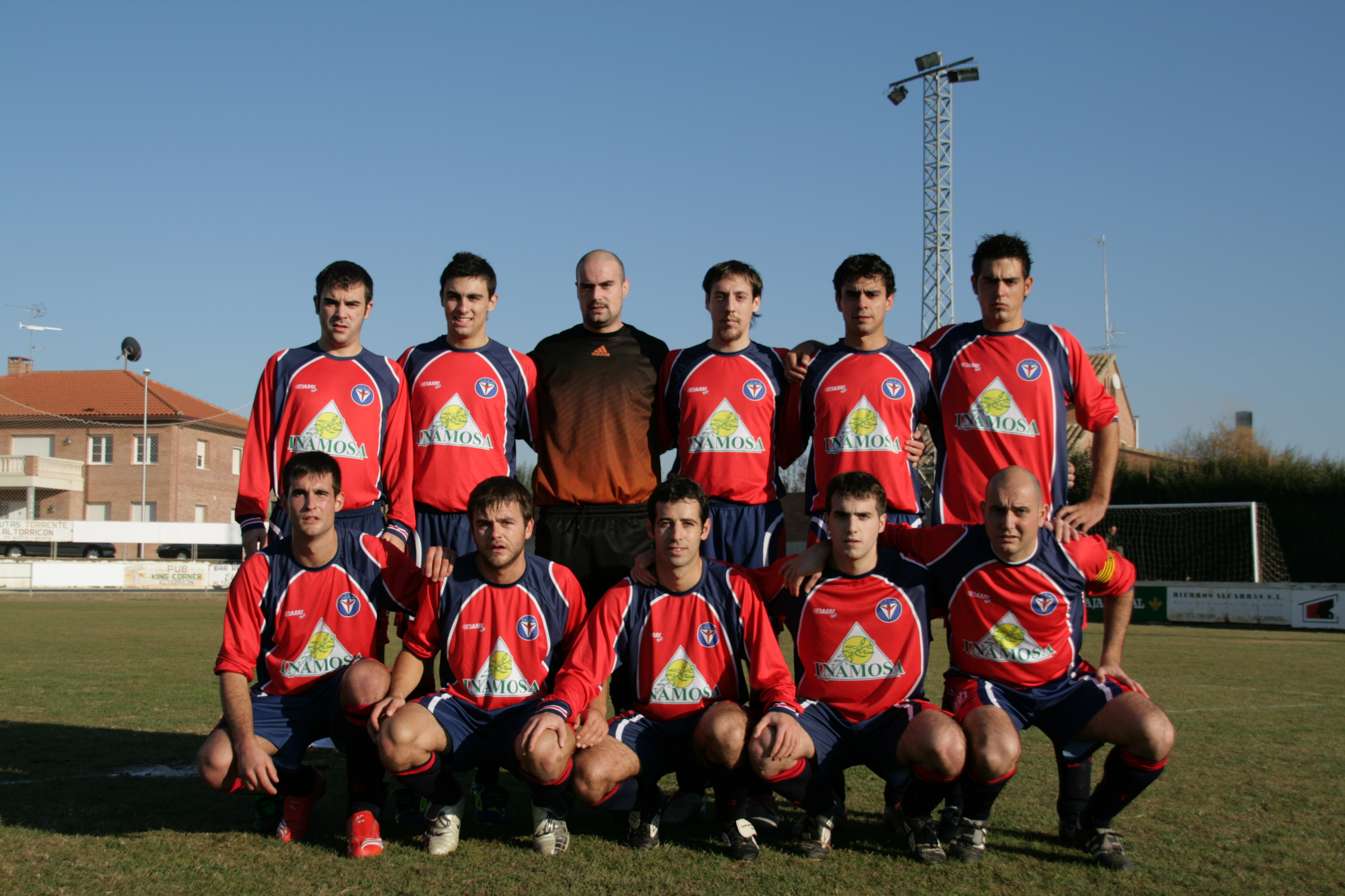 FC Lalueza